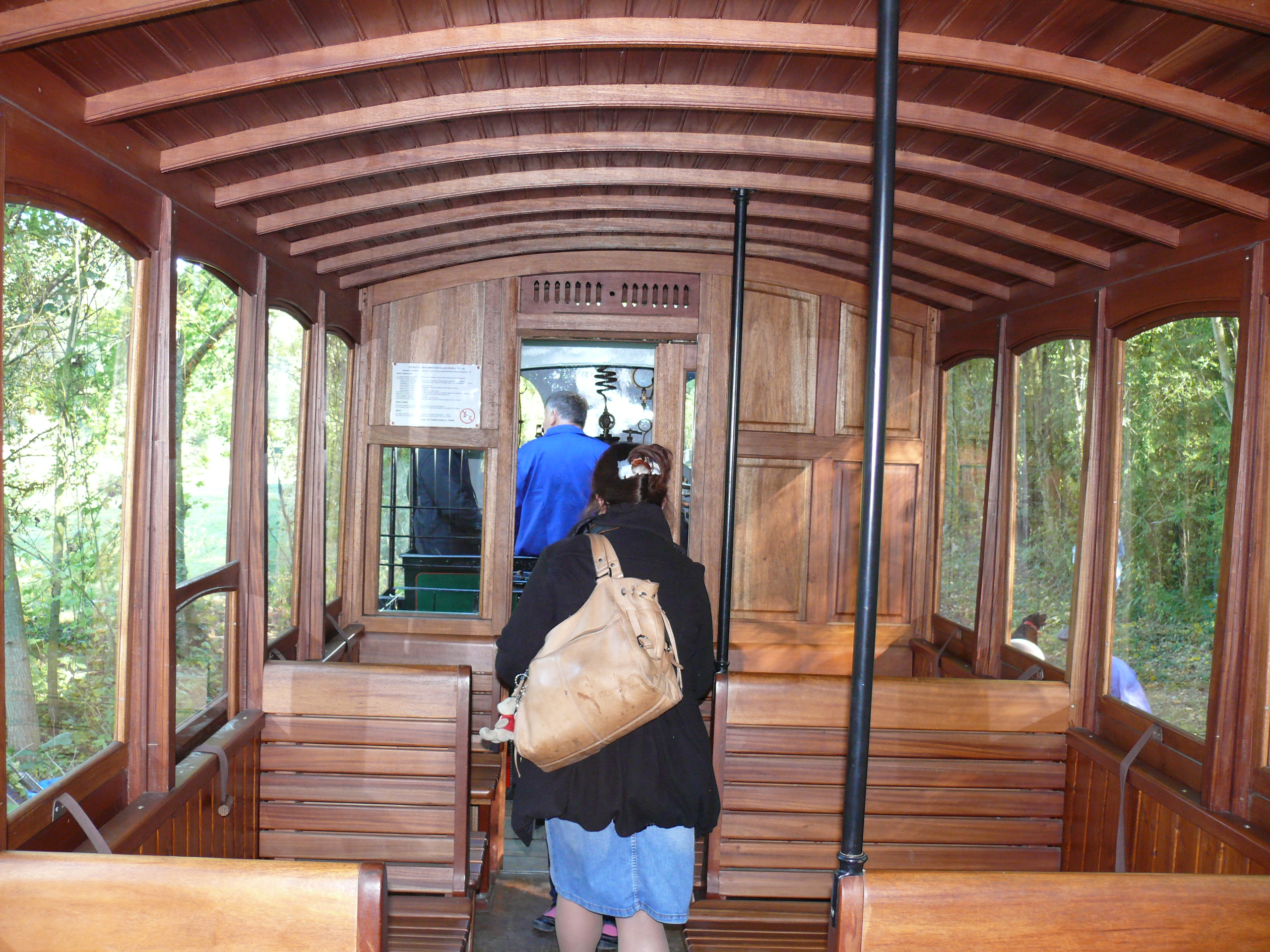 Intérieur de la voiture n°B 328 des CBR, construite par Blanc-Misseron en 1892, restaurée par le MTVS, lors de son déplacement à la gare de Saint-Omer-en-Chaussée